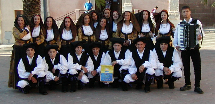 (Fabrizio Muggianu, Il gruppo folk Pro Loco Triei al completo, licenza cc-by)